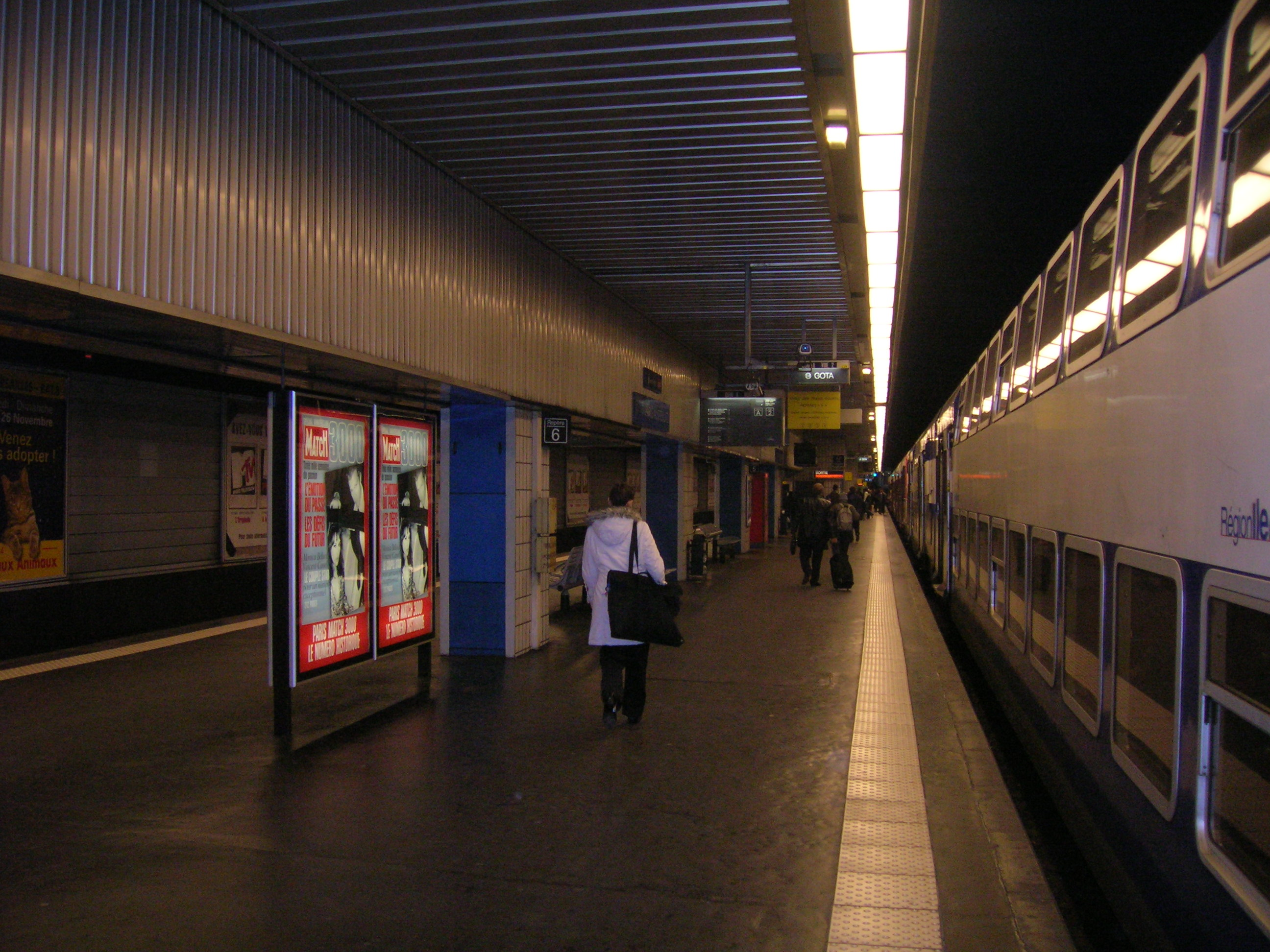 Gare d'Austerlitz, station RER C, Paris